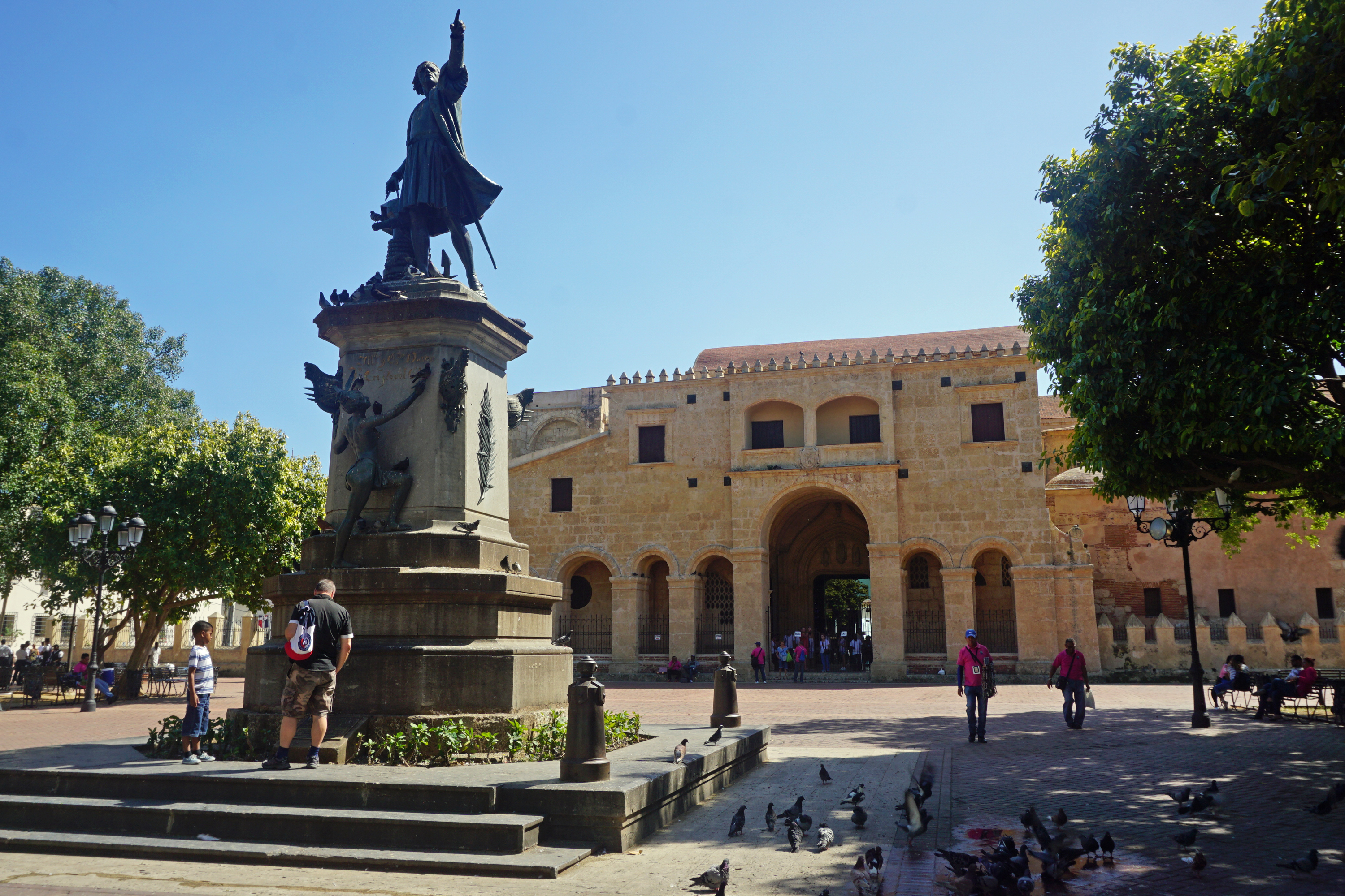 Parque Colón, Ciudad Colonial de Santo Domingo (CCSD), República Dominicana. Catedral de Santa Maria la Menor al fondo.